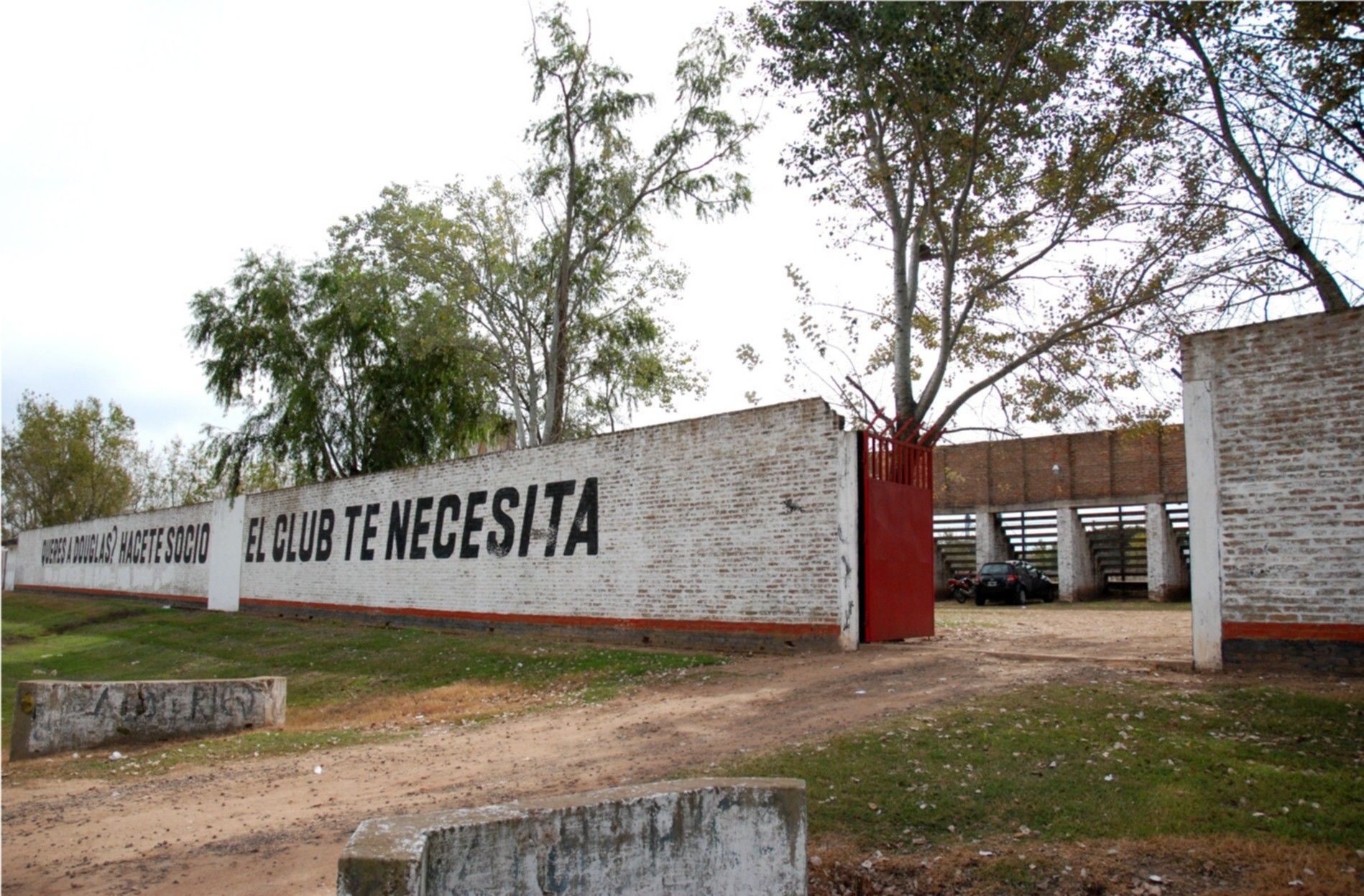 Estadio "Miguel Morales" del Club Atlético Douglas haig de Pergamino, provincia de Buenos Aires, Argentina